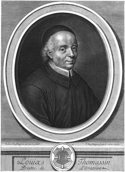 "Louis Thomassin, prêtre de l'Oratoire."